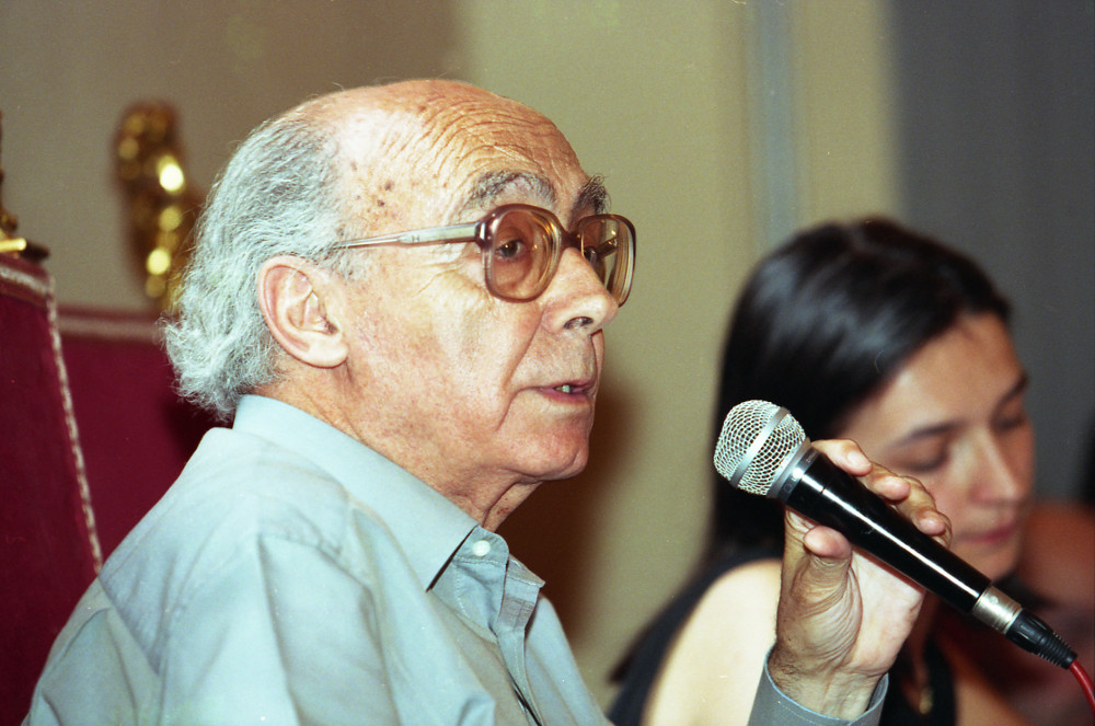 Josè Saramago durante la conferenza a Visionaria 1999